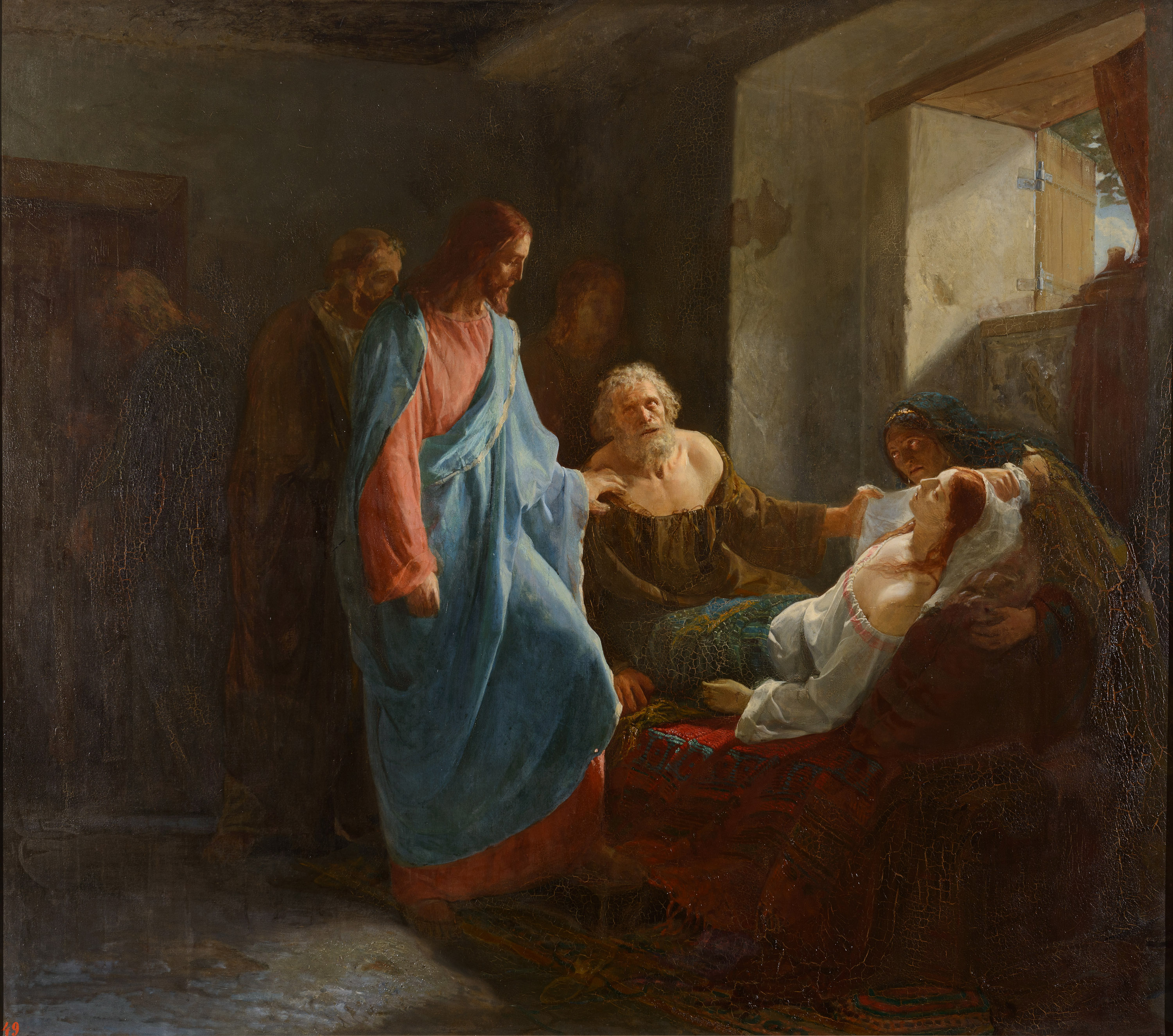 Воскрешение дочери Иаира - художник Михаил Михайлович Зеленский (1843 — после 1882).